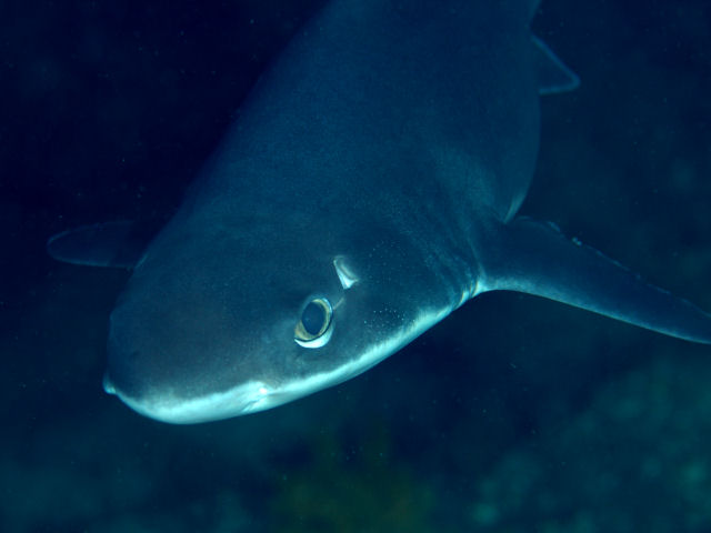 フトツノザメ Squalus mitsukurii